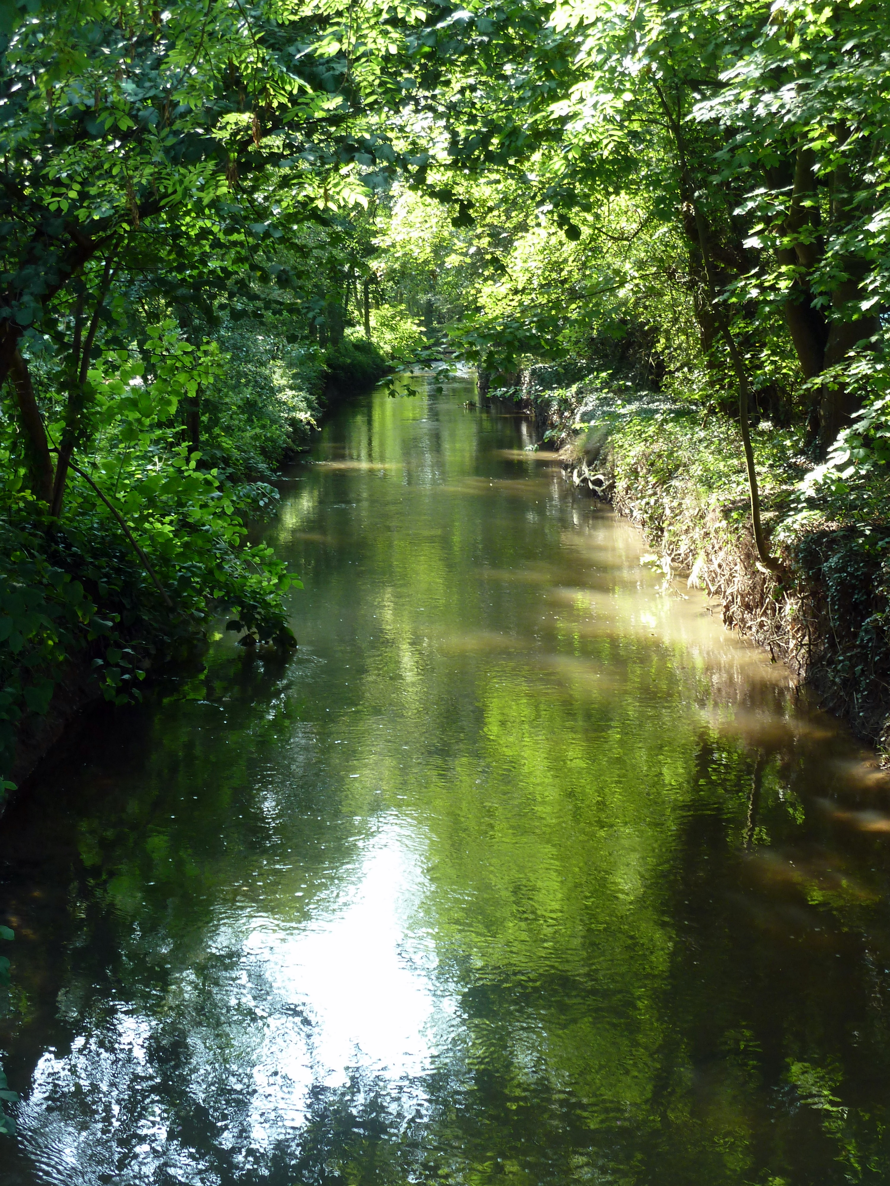 Der Angerbach am Angermunder See